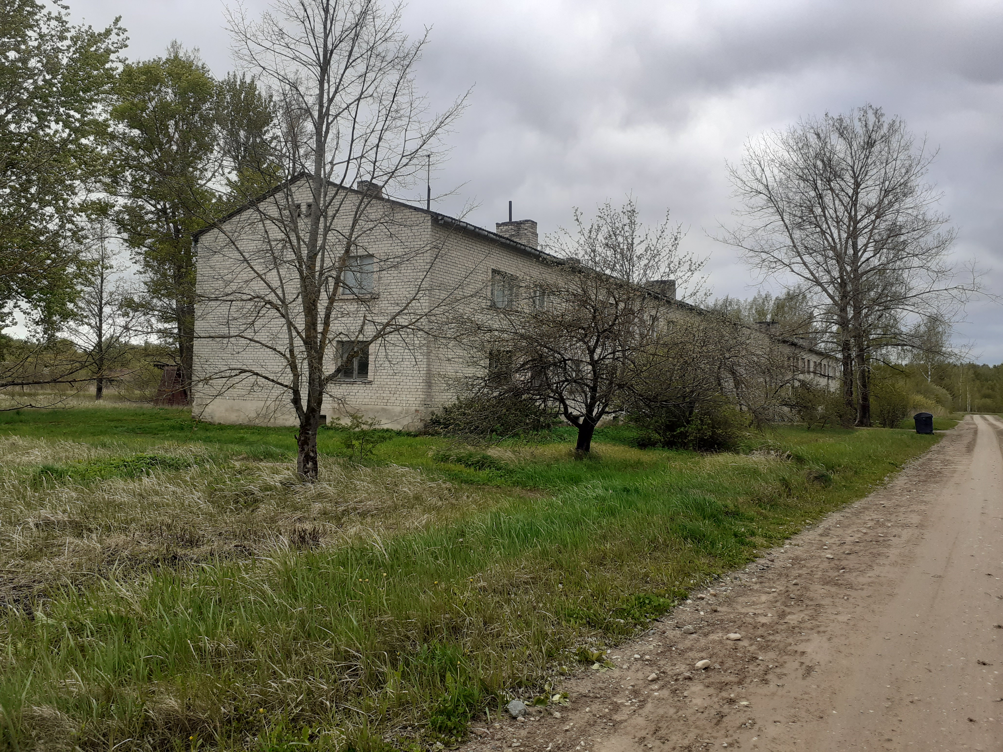 Lūza 2020